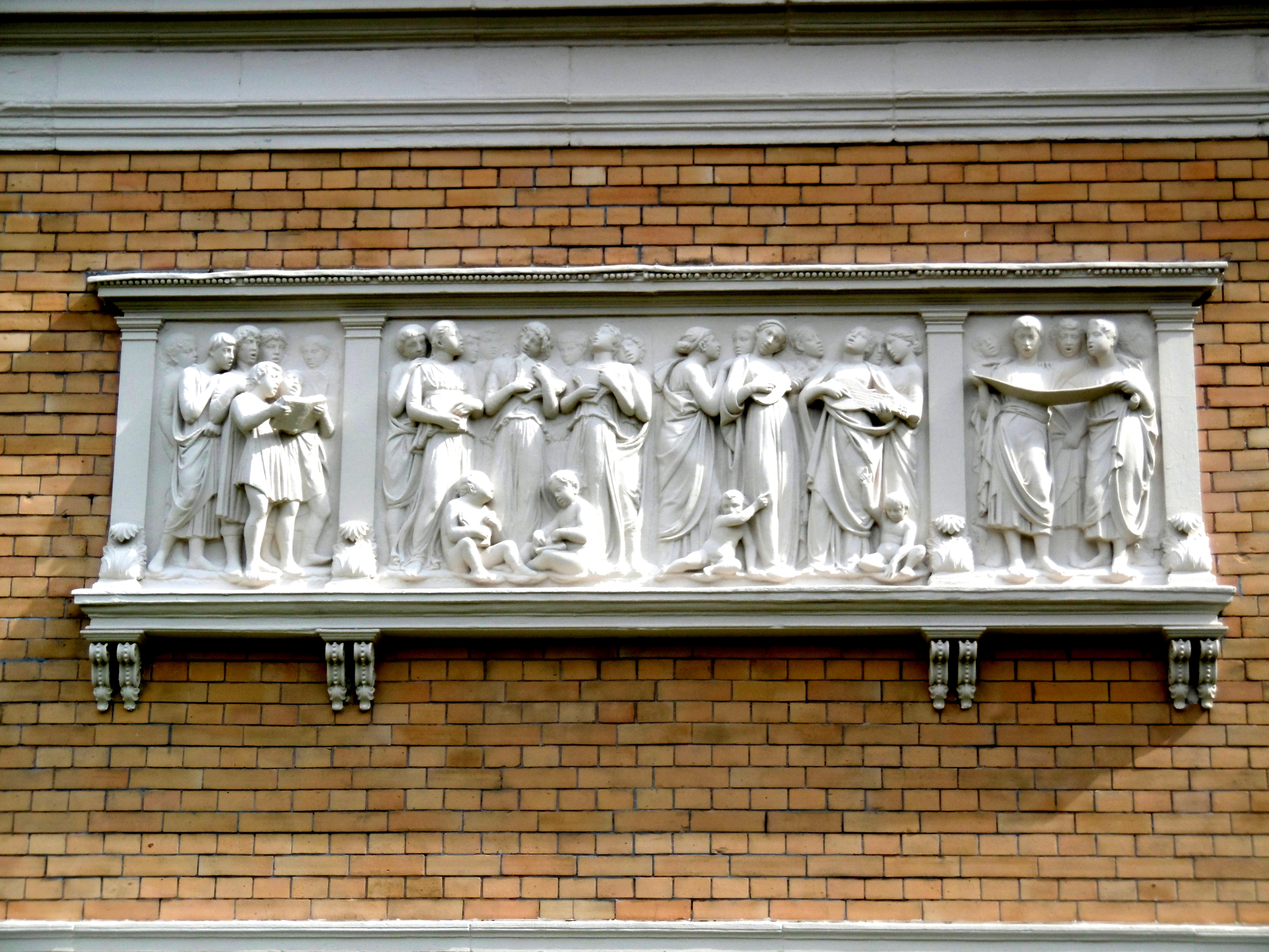 Villa Peters in Eupen, heute Musikakademie, Relief an der westlichen Außenwand